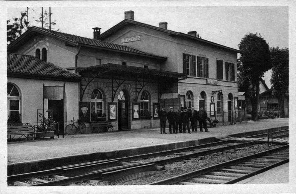 Bâtiment voyageurs et intérieur de la gare vers 1920.